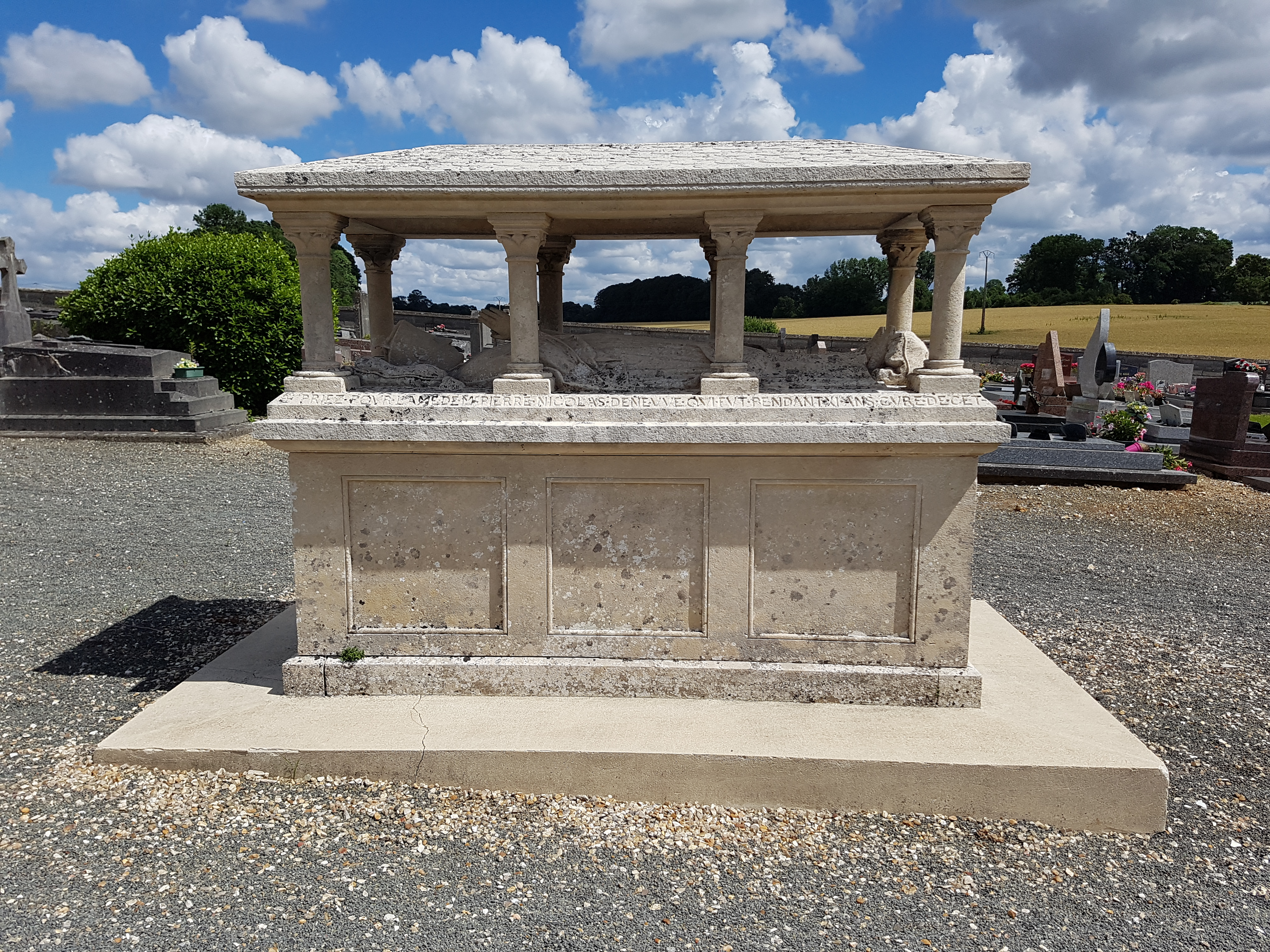 Tombeau avec gisant de Pierre Nicolas Deneuve, curé de Limésy puis de Sotteville-les-Rouen.